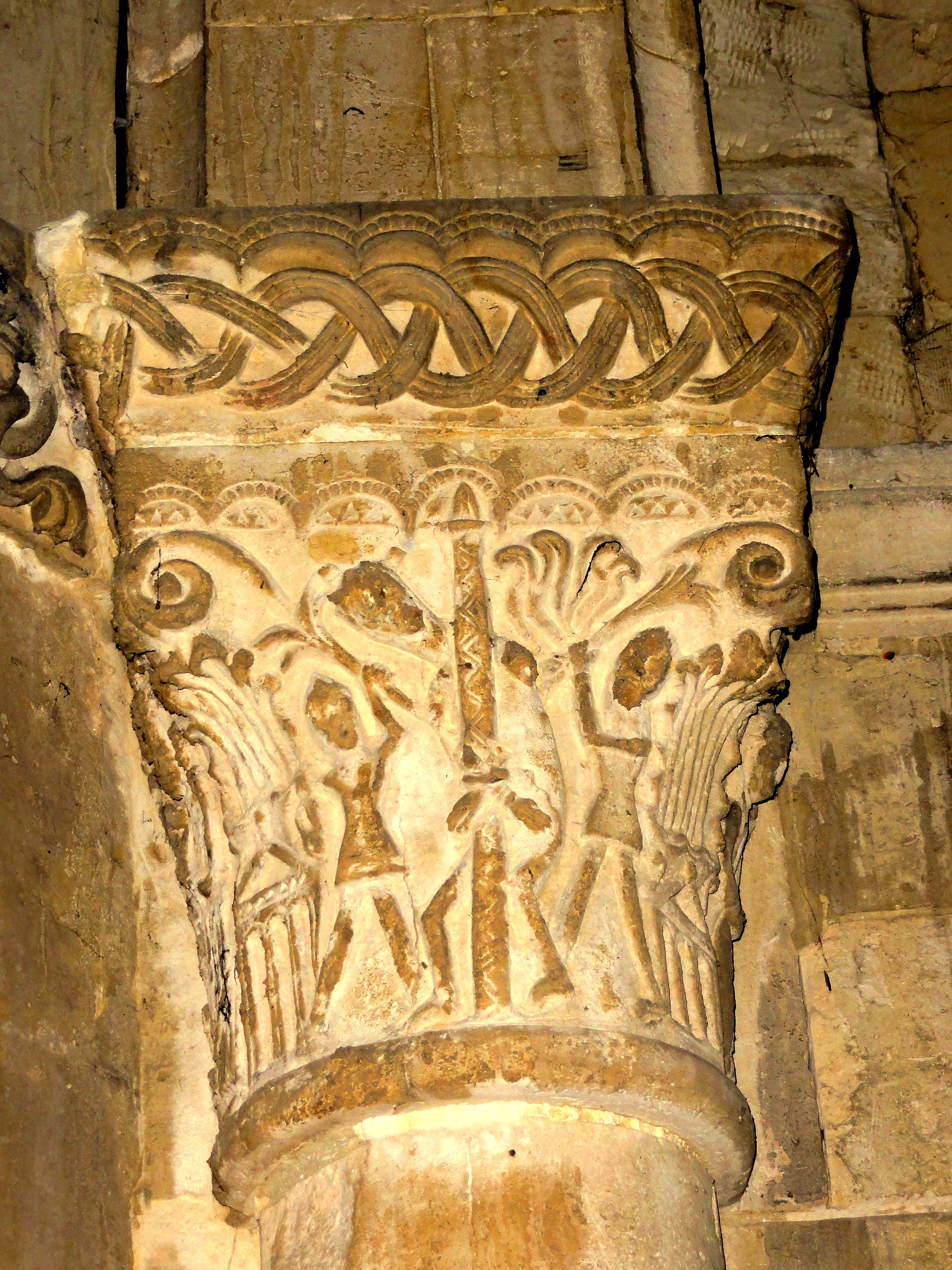 Chapiteau(x) de l'église (voir titre).